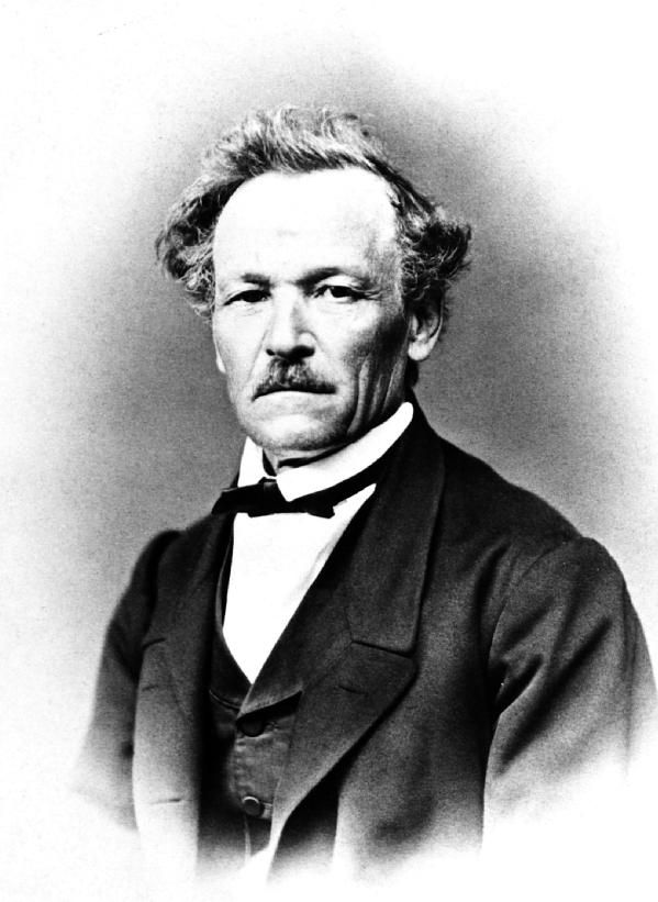 Wilhelm Christian Friedrich Bock (1815–1888), Bürgermeister der Stadt Weimar